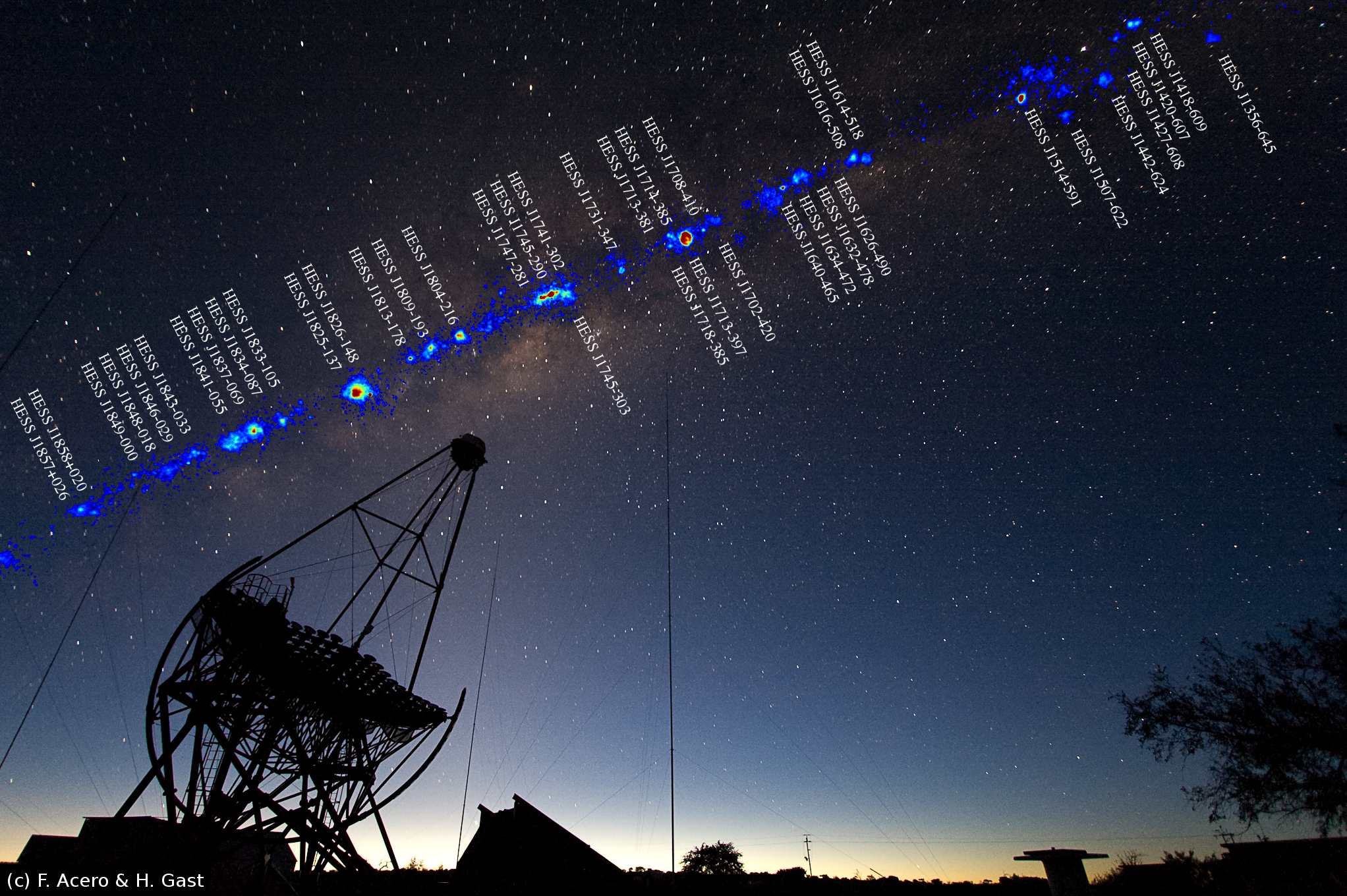 High Energy Stereoscopic System-Gammastrahlungsquellen auf ein Bild der Milchstraße montiert